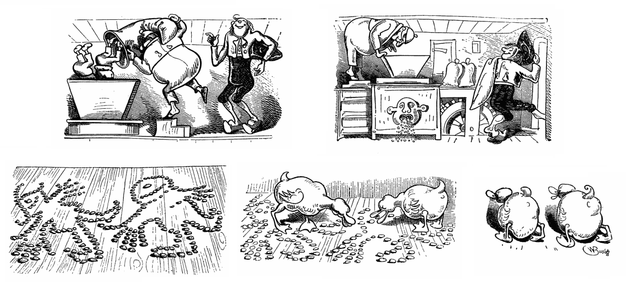 Wilhelm Busch: Ende des letzten Streichs von Max und Moritz Darstellung eines irreversiblen Prozesses: Wilhelm Busch machte durch Einfügung eines Zwischenschrittes die Vergeblichkeit einer Umkehrung der Zerstörung besonders deutlich: Eine zufällige Strukturbildung (auch noch mit extrem niedriger Auftrittswahrscheinlichkeit) bringt noch einmal die Umrisse von Max und Moritz hervor. Die Struktur ist aber schon recht weit vom Originalzustand entfernt. Aber auch sie findet dann unwiederbringlich ihr Ende in der Ente.